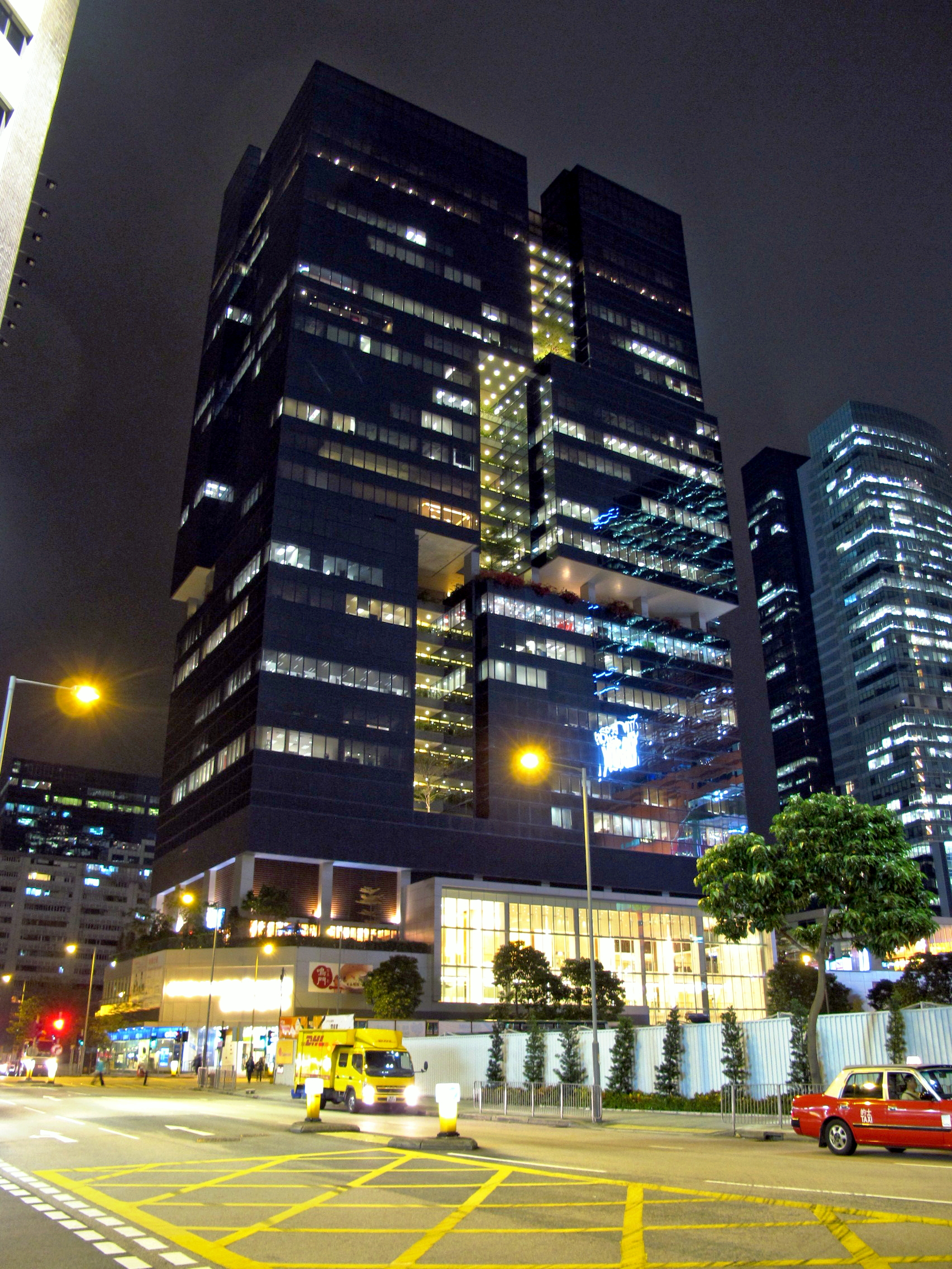 Exchange Tower Night View